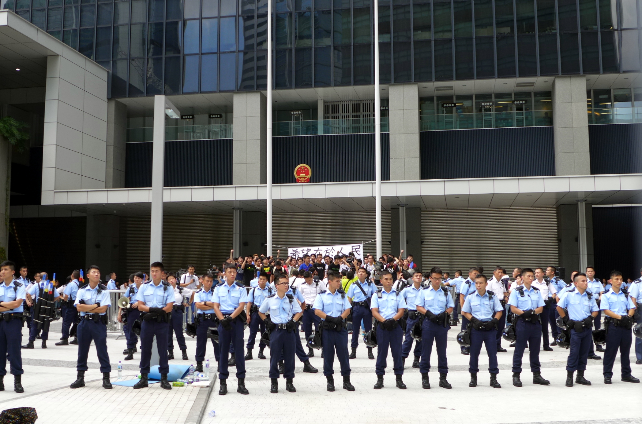 9.27 CGO Civil Plaza protesters